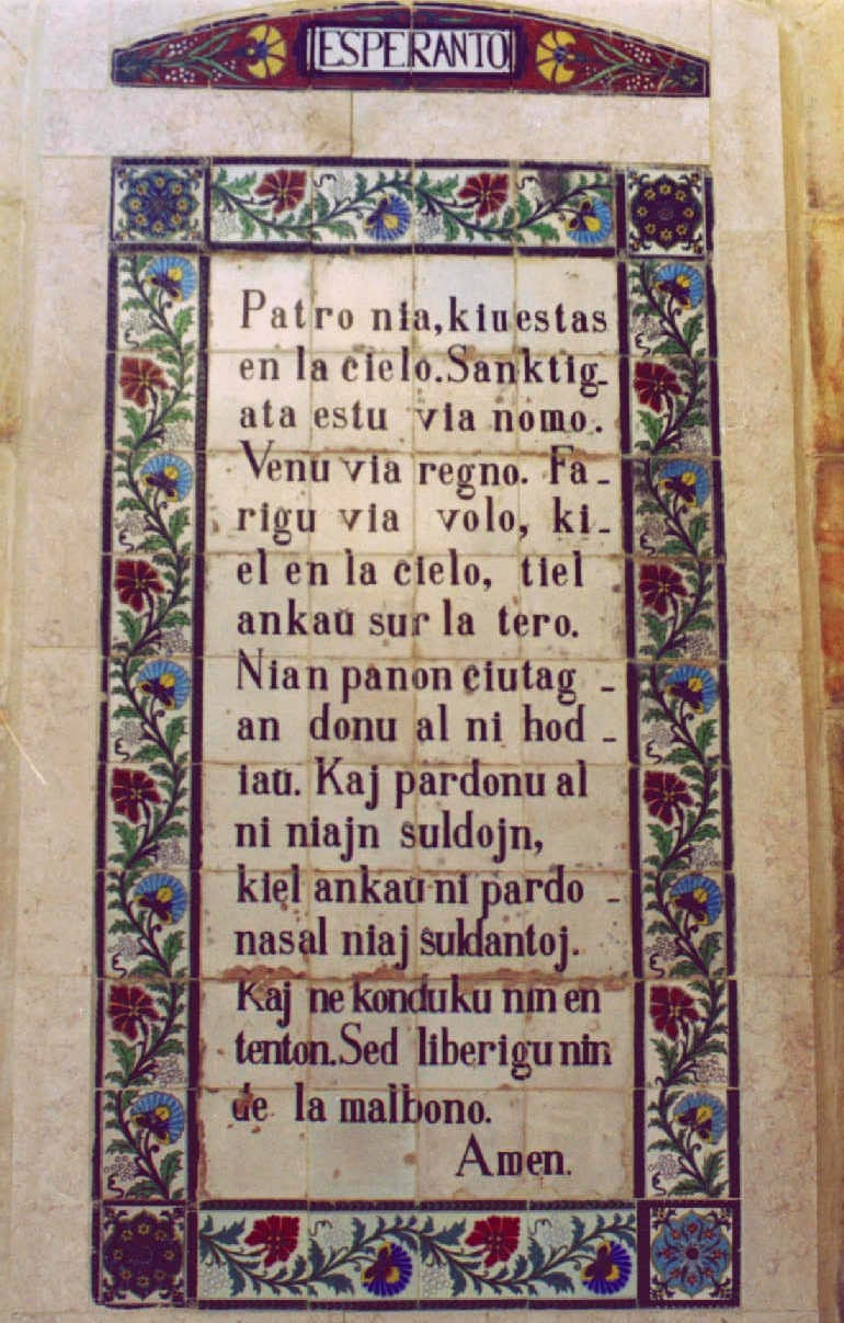 Patro Nia en Esperanto (ceramiko en la Kapelo Pater Noster en Jerusalemo)